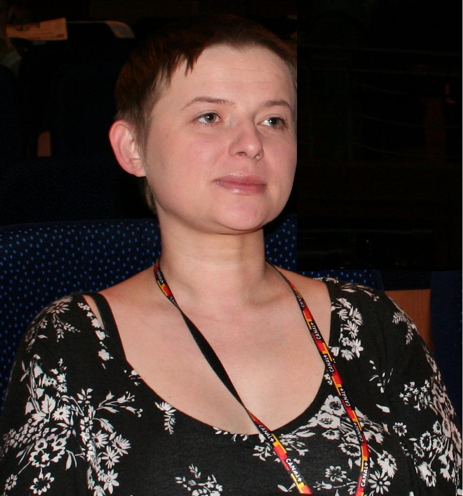 Autor-Paweł Gościcki, , "Copyright 2006 (c) Paweł Gościcki". Zgoda-O pozwolenie poprosił Dariusz Kałan, zostało udzielone przez autora Pawła Gościckiego, cytat z emaila: "Zgadzam się na umieszczenie mojego zdjęcia na warunkach licencji cc-by-sa-2.5, prosząc jednocześnie o dodanie tej informacji, że autor zdjęcia prosi o kontakt mailowy w przypadku wykorzystywania komercyjnego."